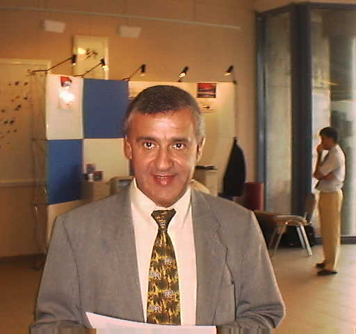 Foto van Marcel Roofthoofd